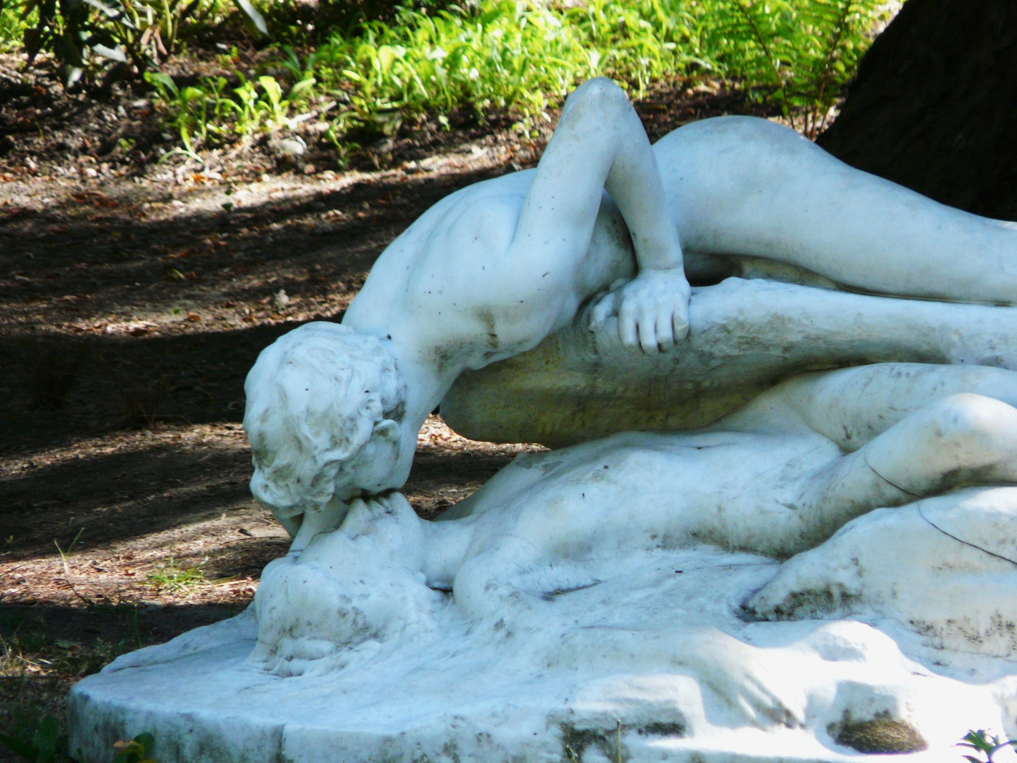 Détail de la statue du Baiser à la Source, œuvre d'Henri Coutheillas, parc du casino de Bagnères-de-Luchon, Haute-Garonne, France.